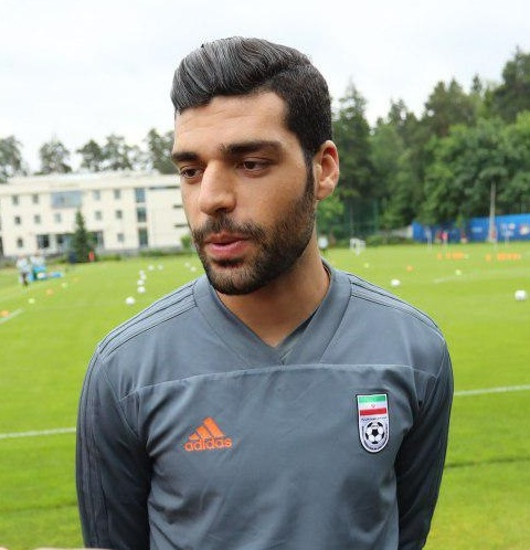 مهدی طارمی در تمرین تیم فوتبال ایران پیش از جام جهانی ۲۰۱۸